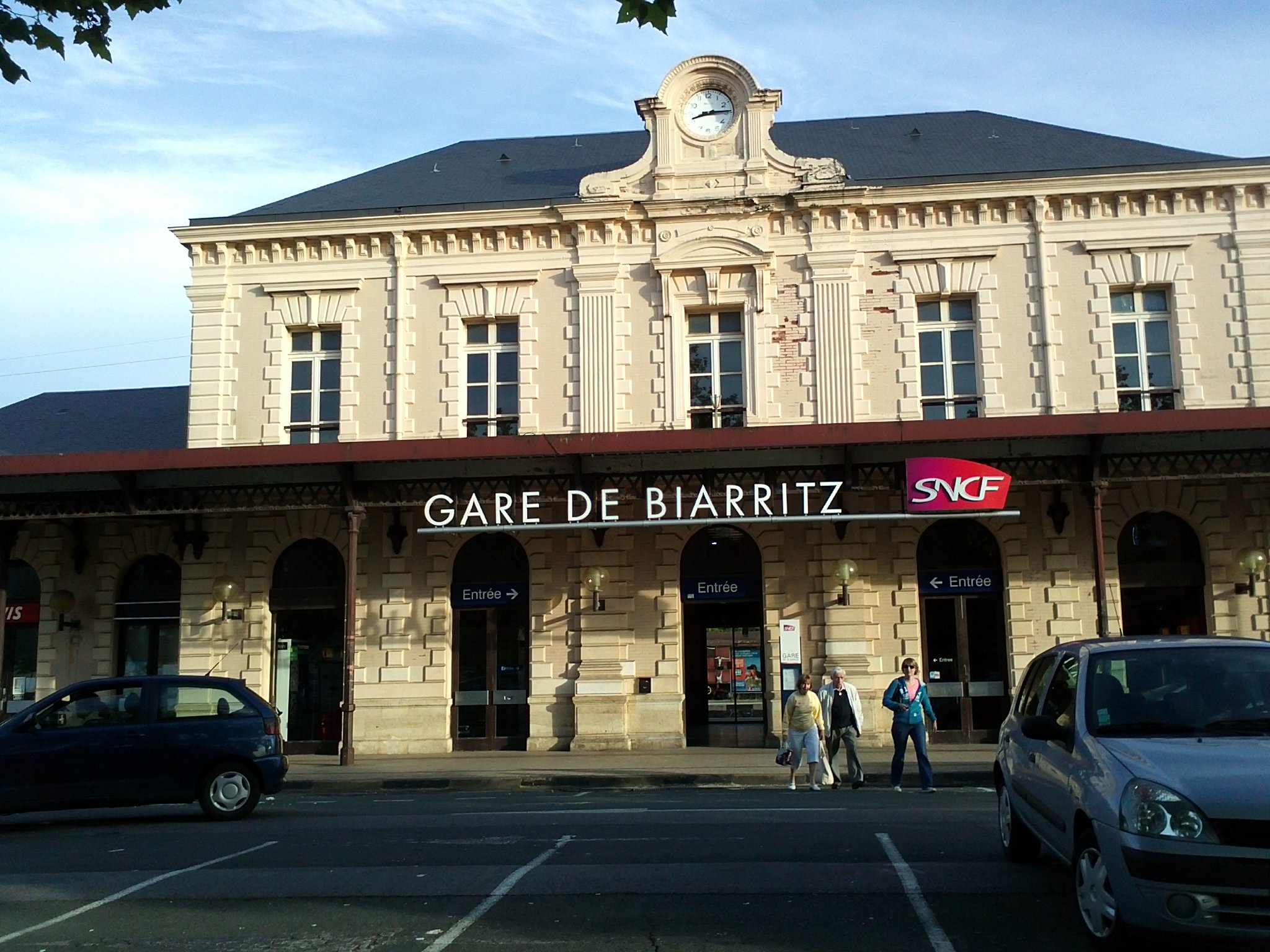 Gare de Biarritz en juin 2012